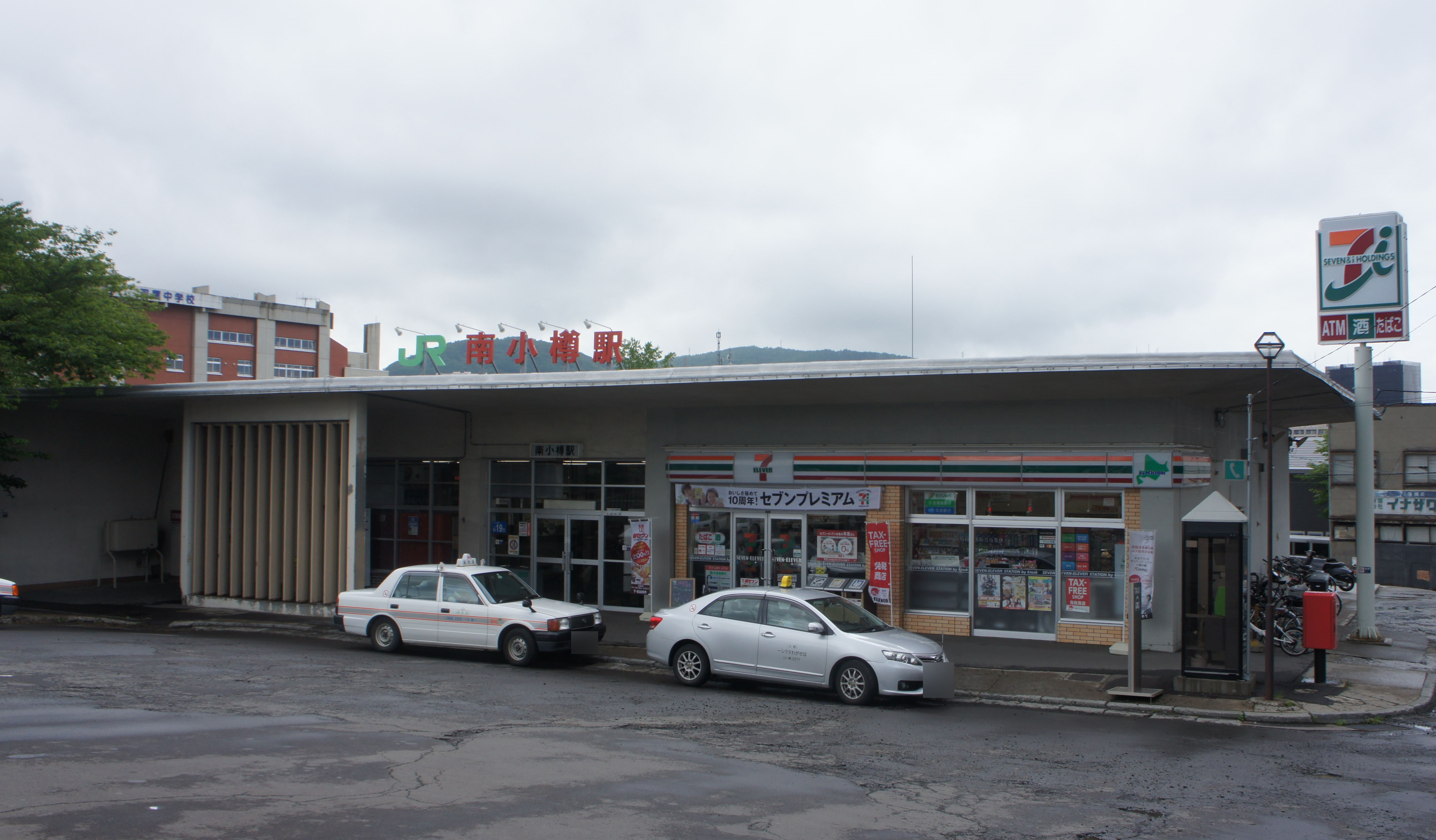 JR函館本線・南小樽駅の駅舎 Sony NEX-3